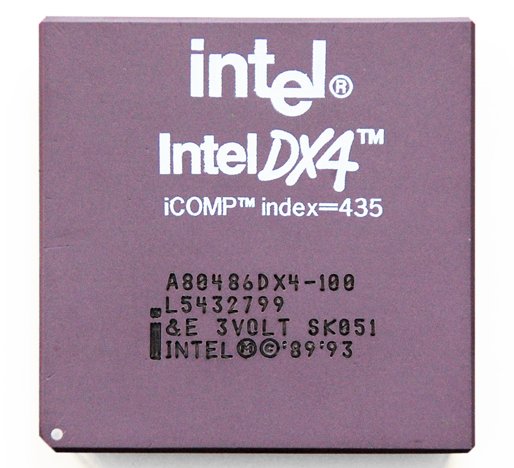 Foto eines Intel i486 DX4 mit 100 MHz